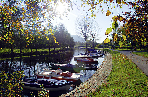 Lendkanal in Klagenfurt 13:10, 8. Jan 2006 Eixi 500 x 328 (203635 Byte) (* Bildbeschreibung: Lendkanal in Klagenfurt * Quelle: upload by ~~~~ with permission of the photographer * Fotograf: Helge Bauer, )